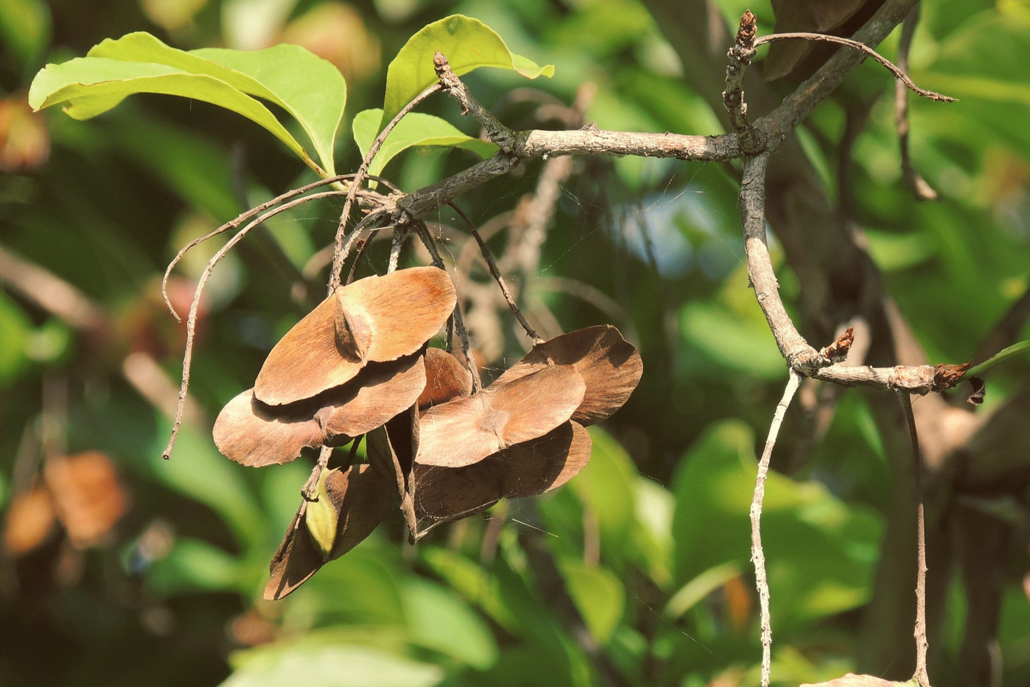 sementes maduras de araçá-d´água / Capitão pelado - Terminalia kuhlmannii